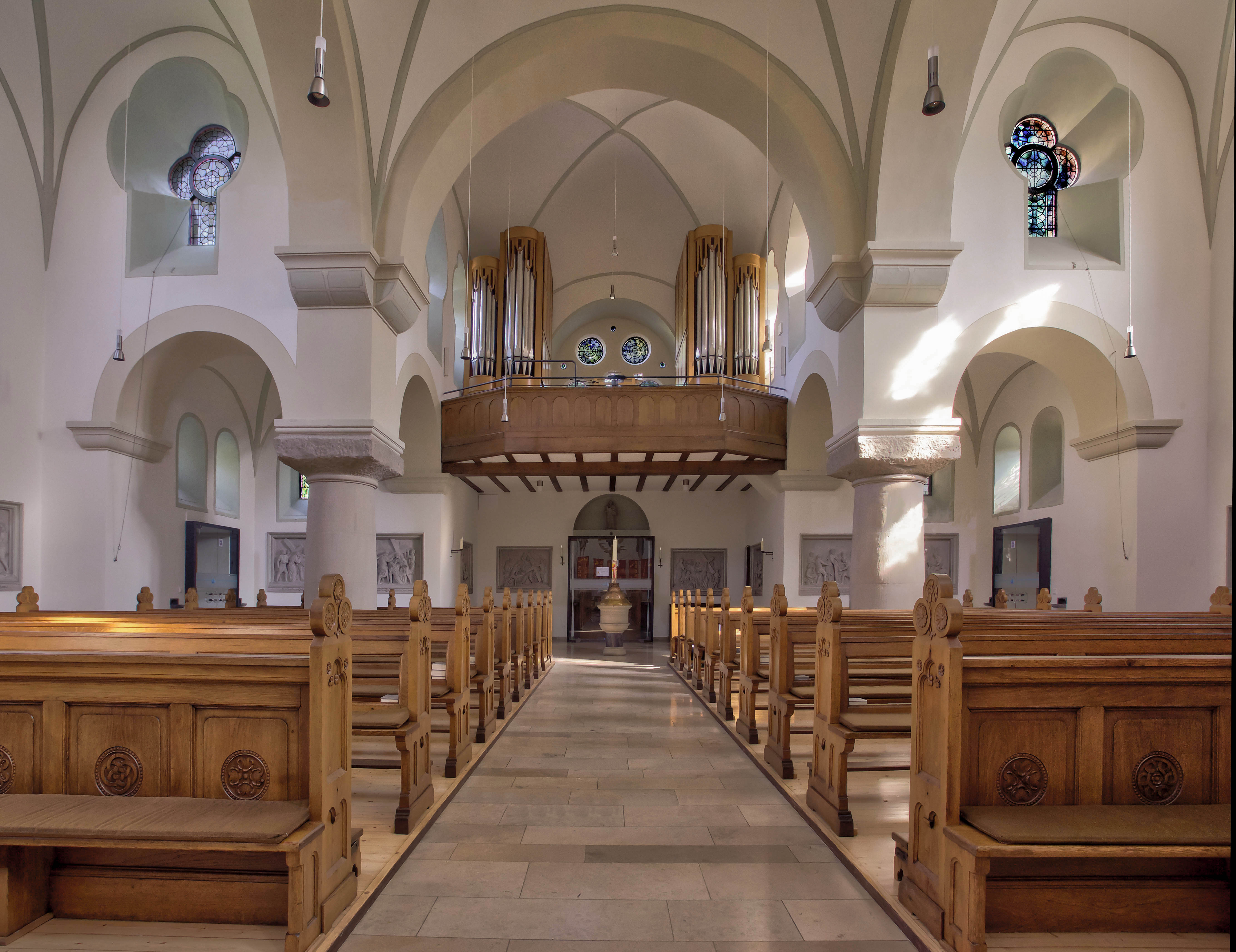 Orgel Hauenhorst neu klein